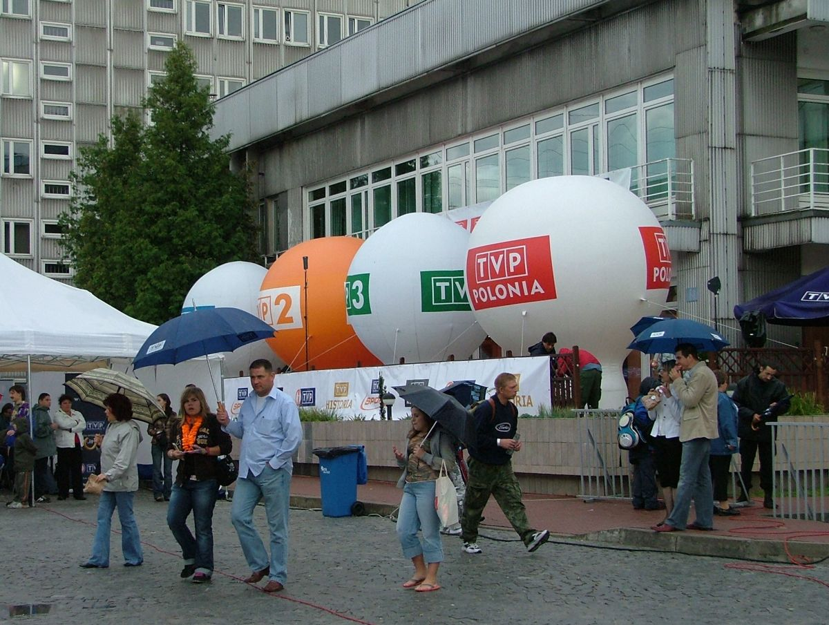 Poland, Warsaw, TVP, Dzień Otwarty Telewizji Polskiej, 9 września 2007